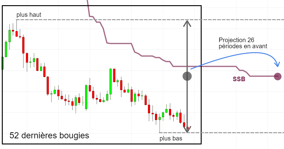 Ichimoku - SSB